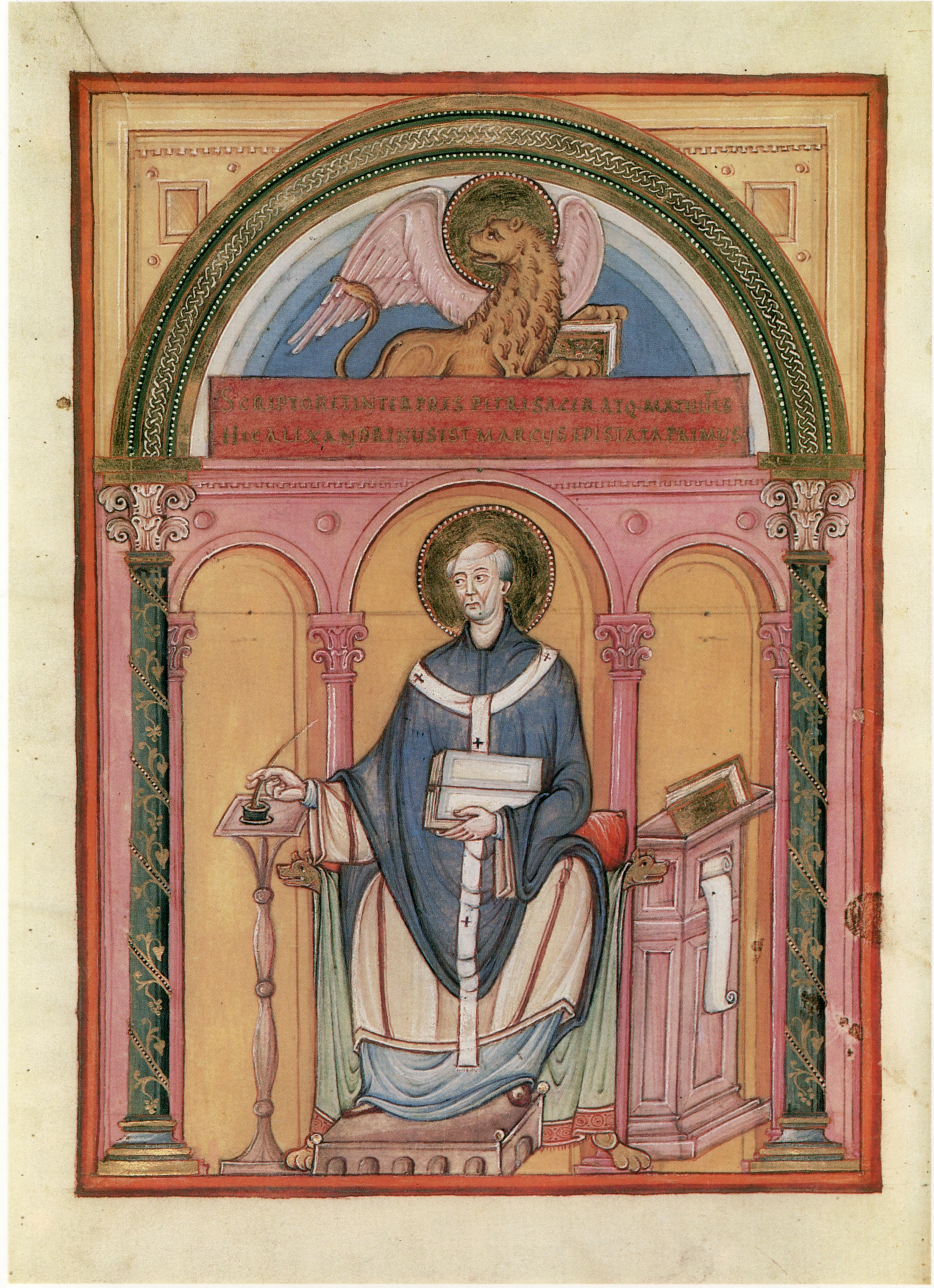 Evangeliar der Sainte Chapelle (Paris, Nationalbibliotek, Lat. 8851), fol. 52v. Evangelist Markus als Bischof.